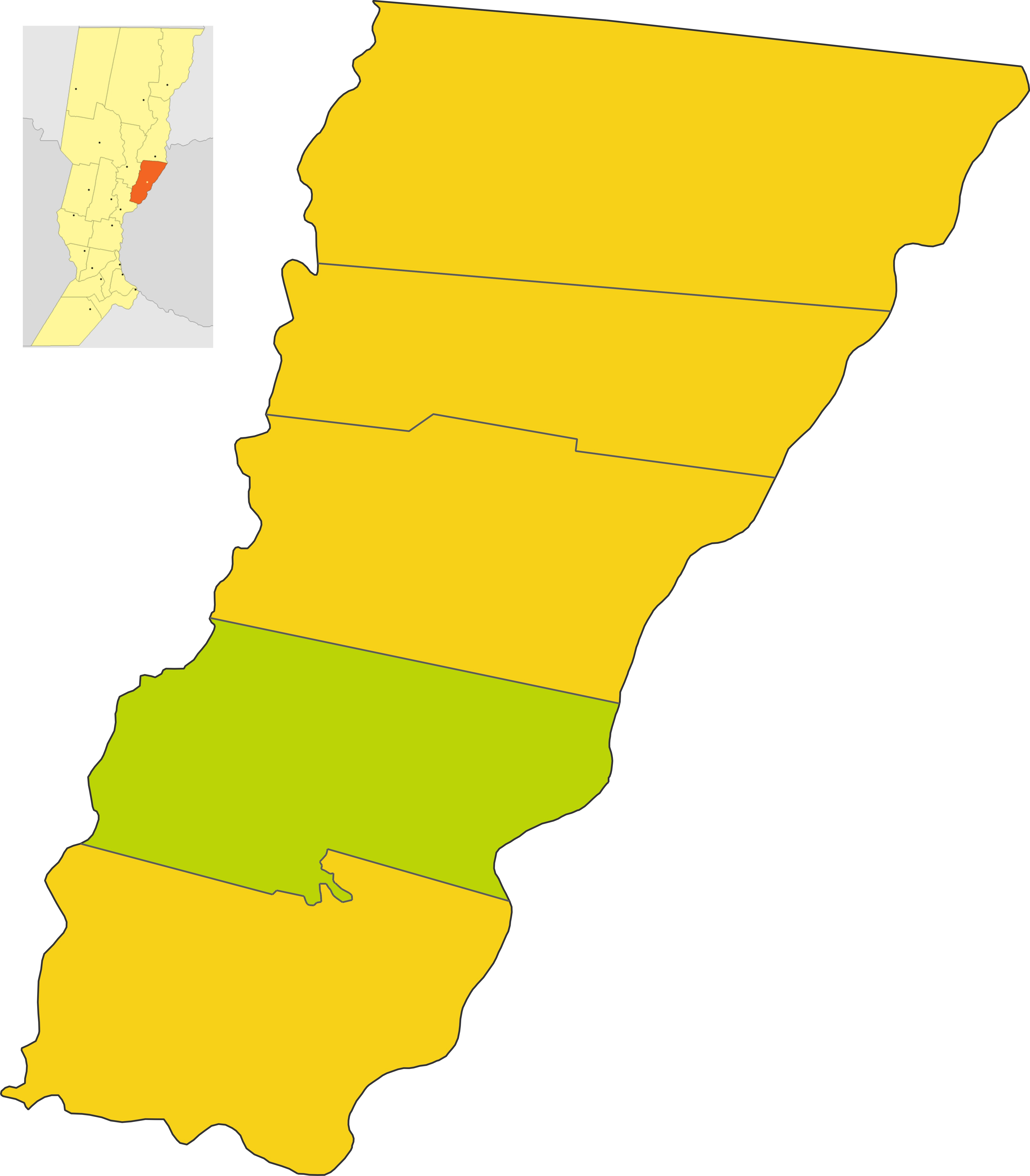 Map of yhe comuna de Cayasta in Garay department, Santa Fe province, Argentina